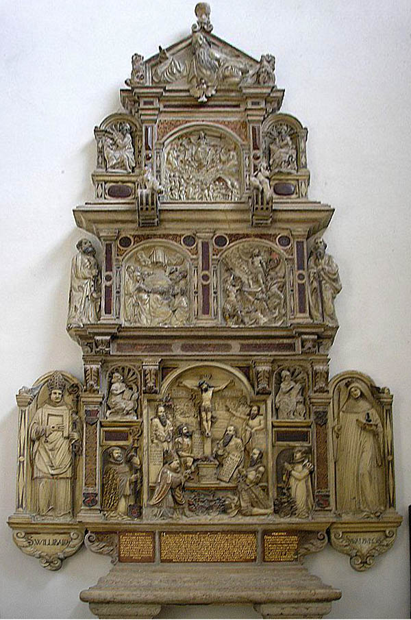 Dom zu Eichstätt (Oberbayern). Epitaphaltar Bischof Martin von Schaumbergs (1560-90). Eigene Aufnahme, April 2007 / Eichstaett cathedral (Upper Bavaria, Germany). Western choir. Epitaph altar of Bishop Martin von Schaumberg (1560-90). Own photo, April 2007